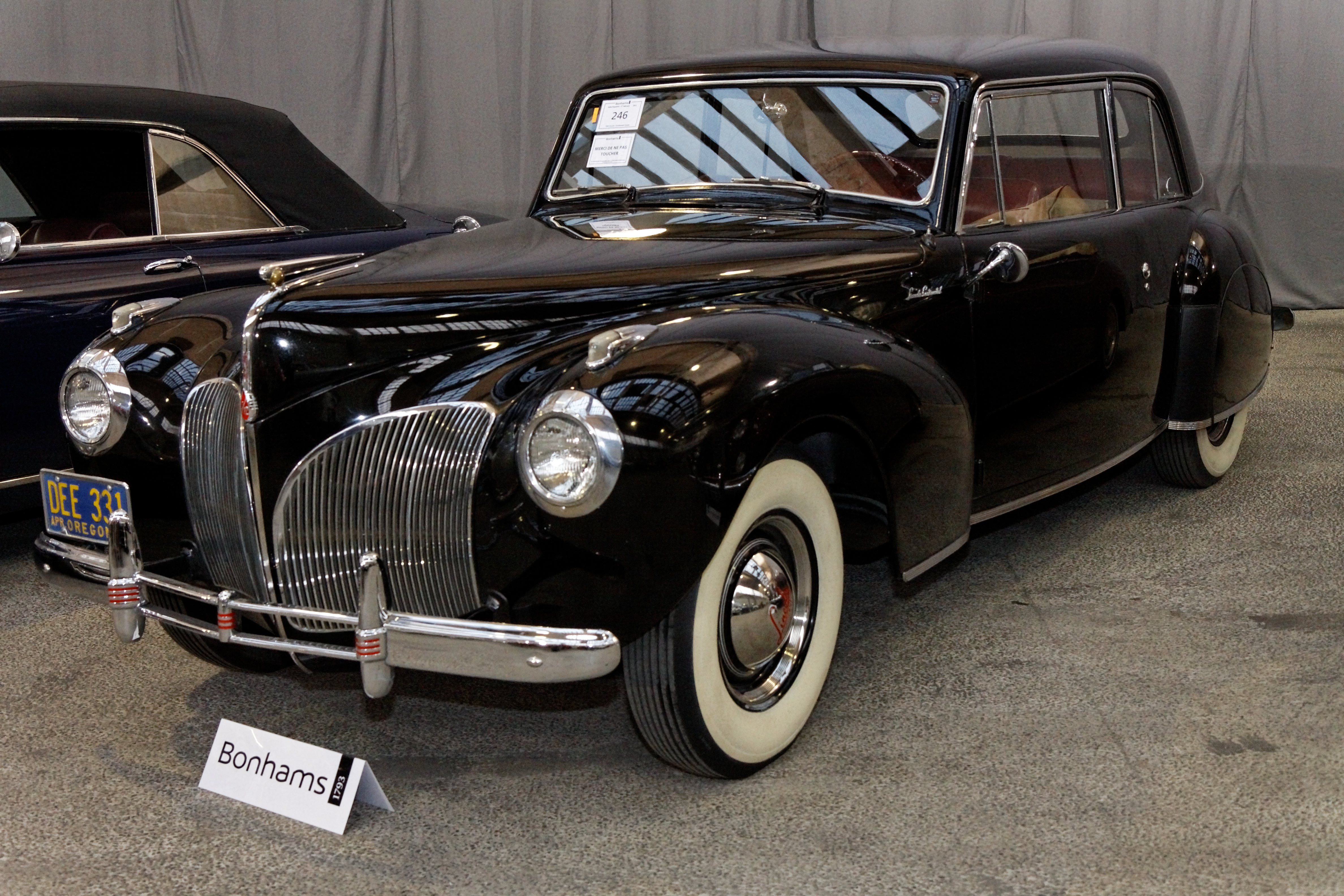 Lincoln Continental Coupe